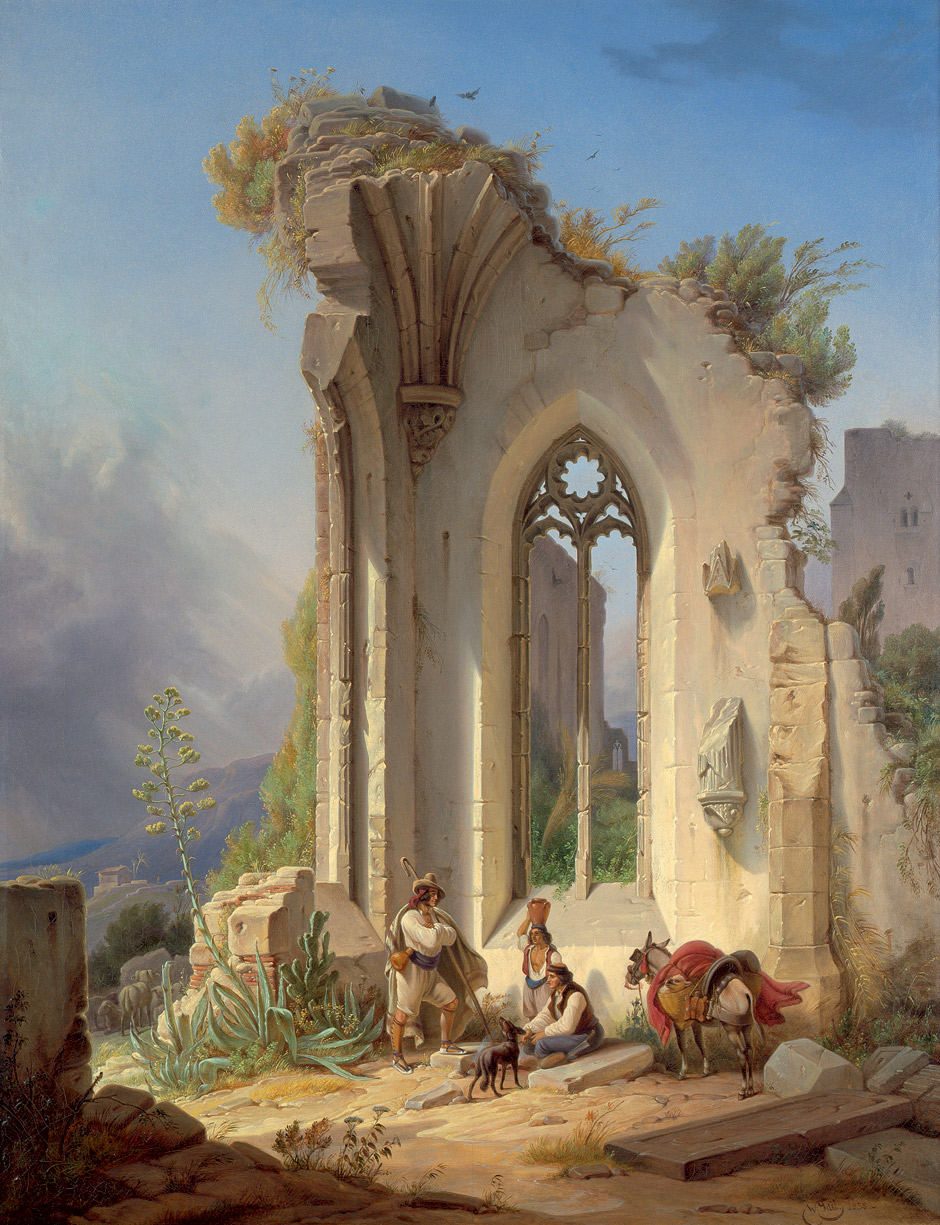 Klosterruine an der Campagna von Valencia. Öl auf Leinwand. 99.5 x 77 cm. Unten rechts signiert "W. Gail 1838", sowie verso eigenh. betitelt und bez. "Kloster-Ruine aus der Campagna von Valenzia gem. v. Wilh. Gail in München 1838".